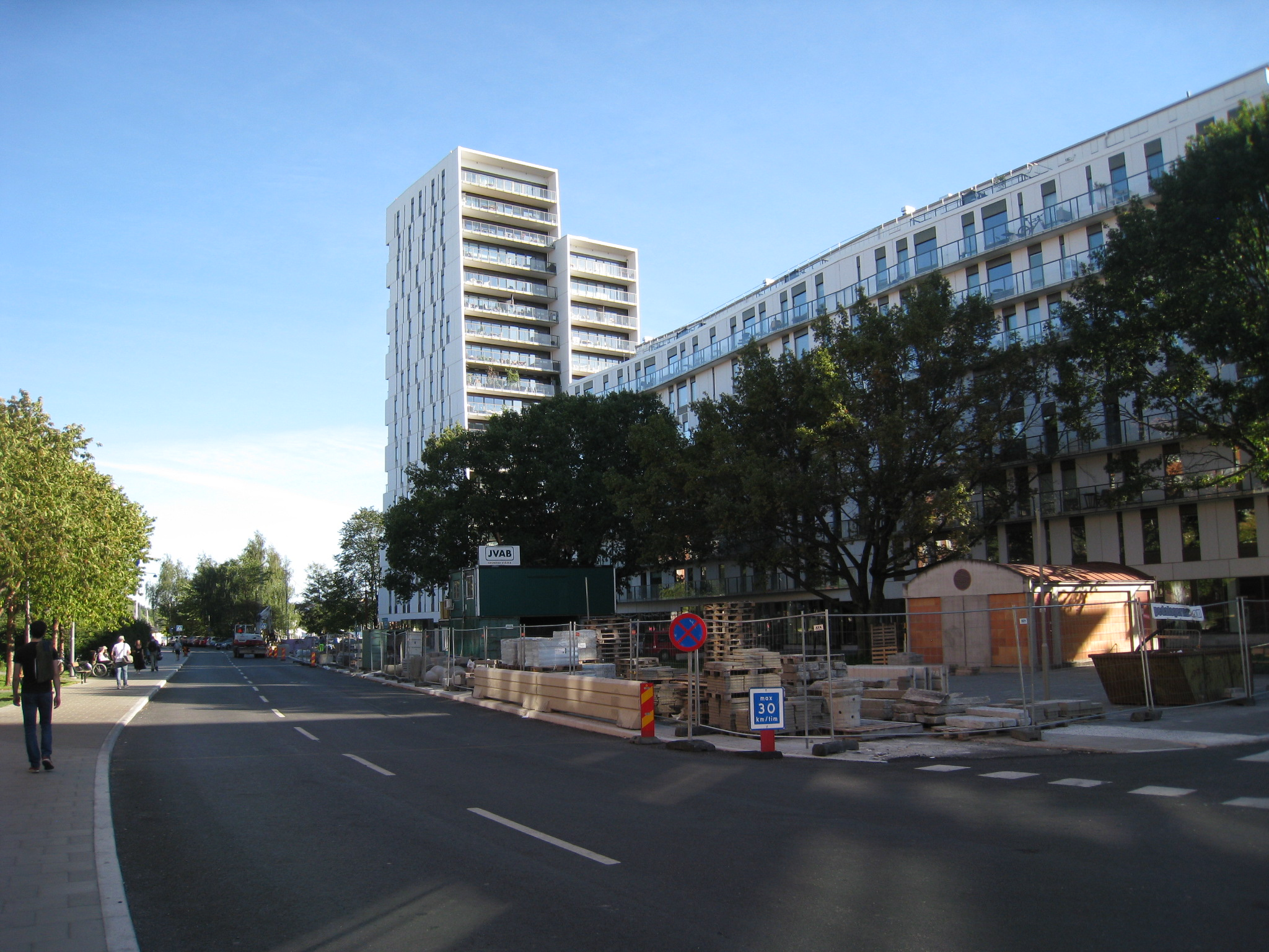 Alviks Torn, vy från väster, Alviks strand, Bromma.